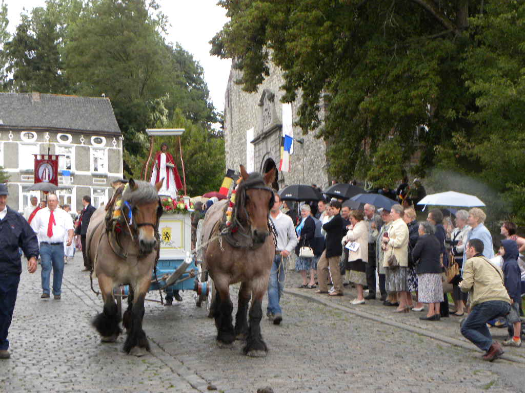 Le cortège quitte l'église après la messe